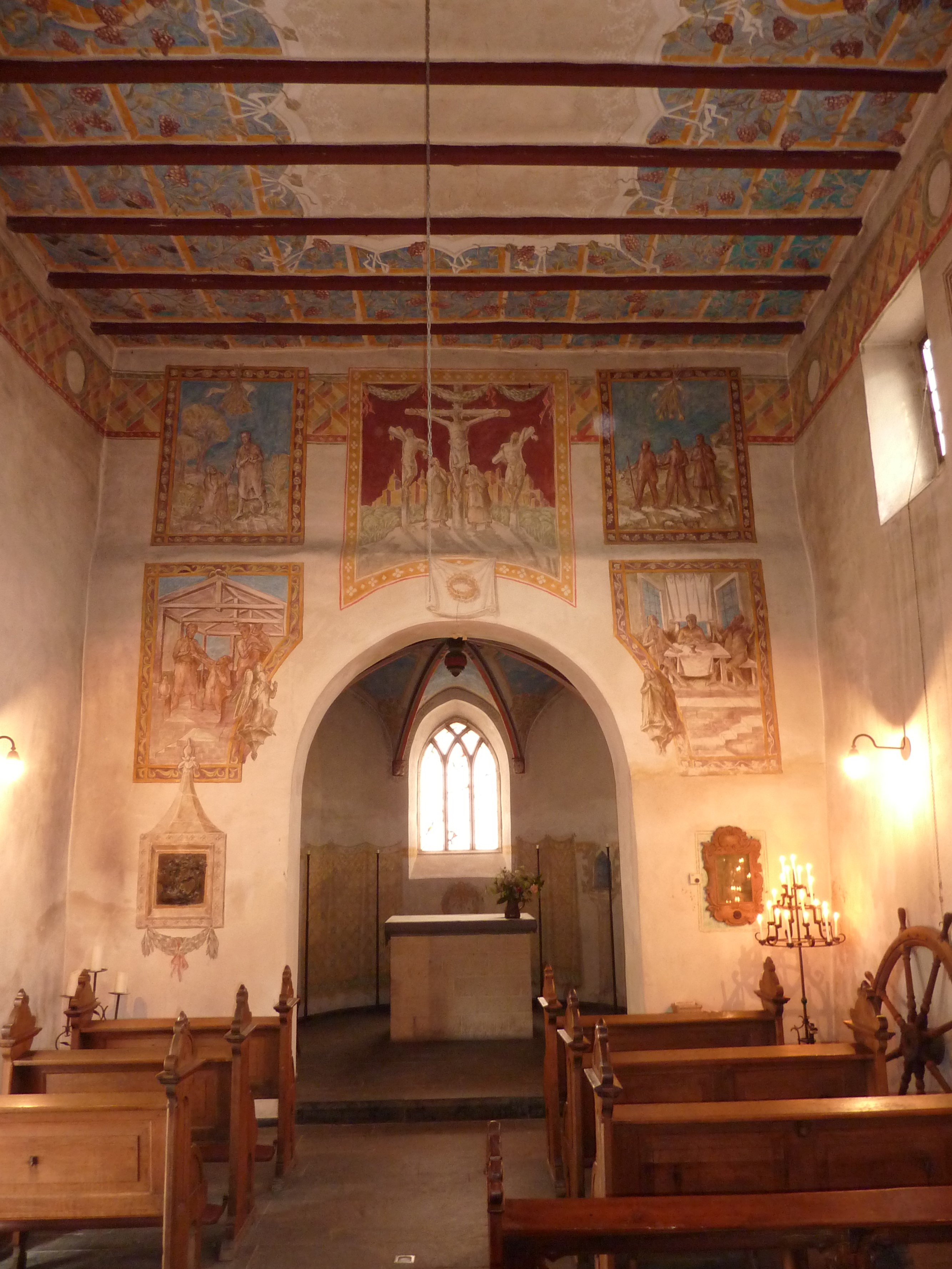 St. Georgskapelle (Köln-Weiß)